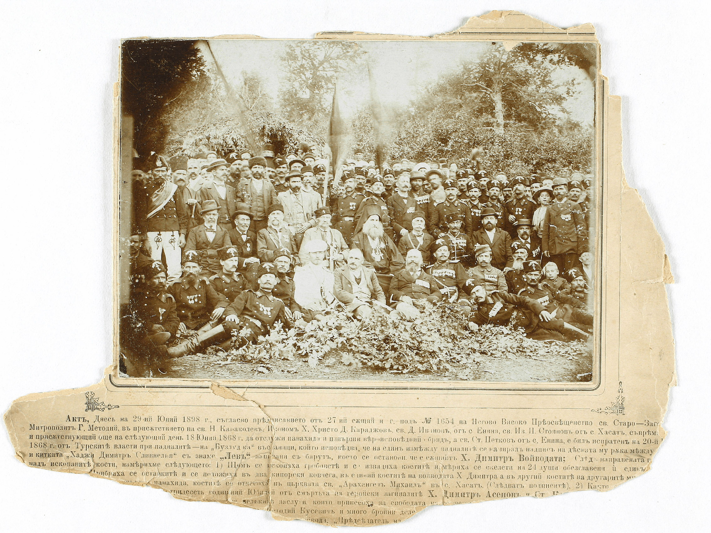 На панихида по повод 30 години от смъртта на Хаджи Димитър, връх Бузлуджа, 29 юни 1898 г. В центъра (седнал, с мустаци) Стоян Заимов, над него Христо Македонски, Филип Тотю, инициаторът на събитието митрополит Методий Старозагорски, Панайот Хитов. Детето с шапката вдясно е Владимир Заимов.